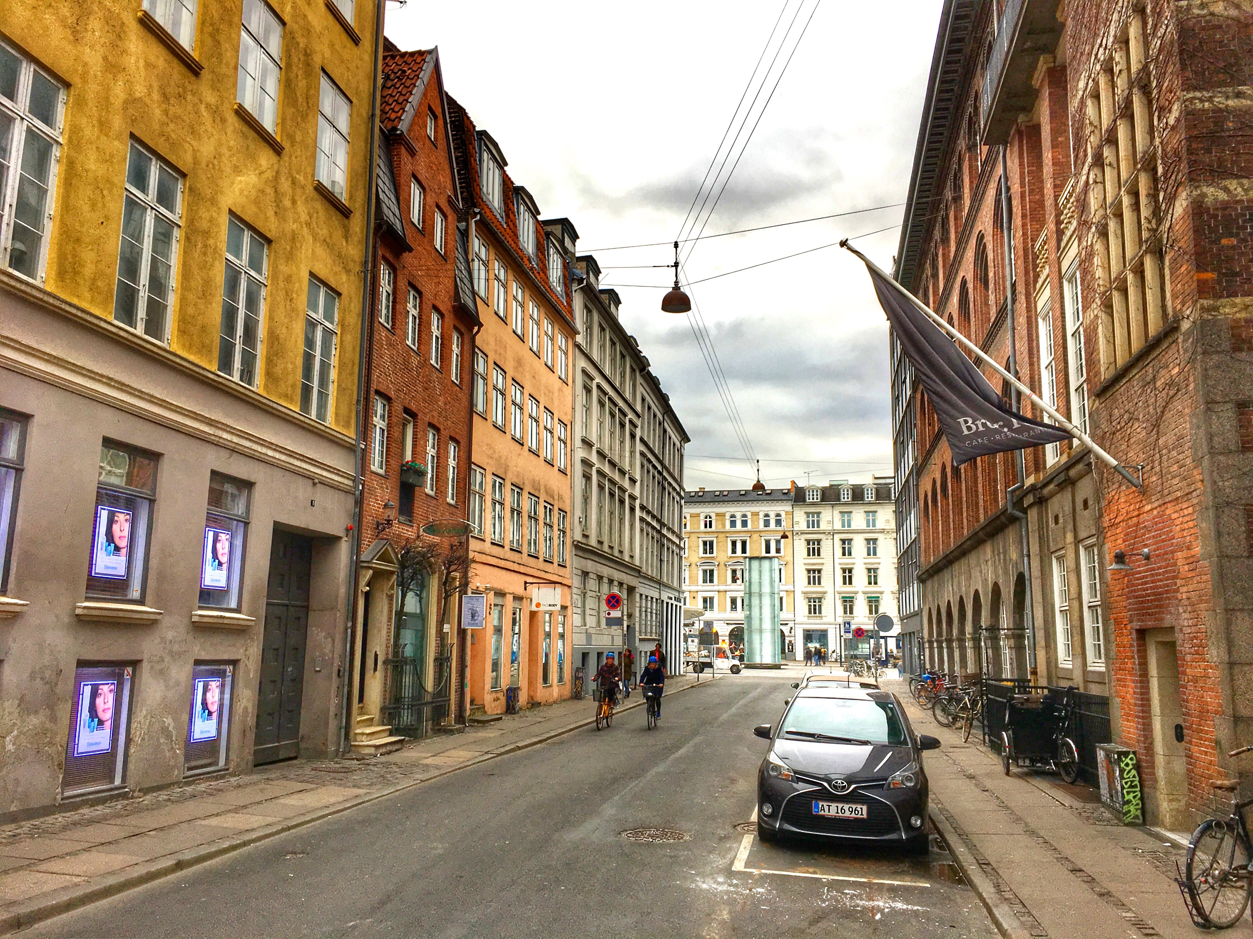 Tornebuskegade, København